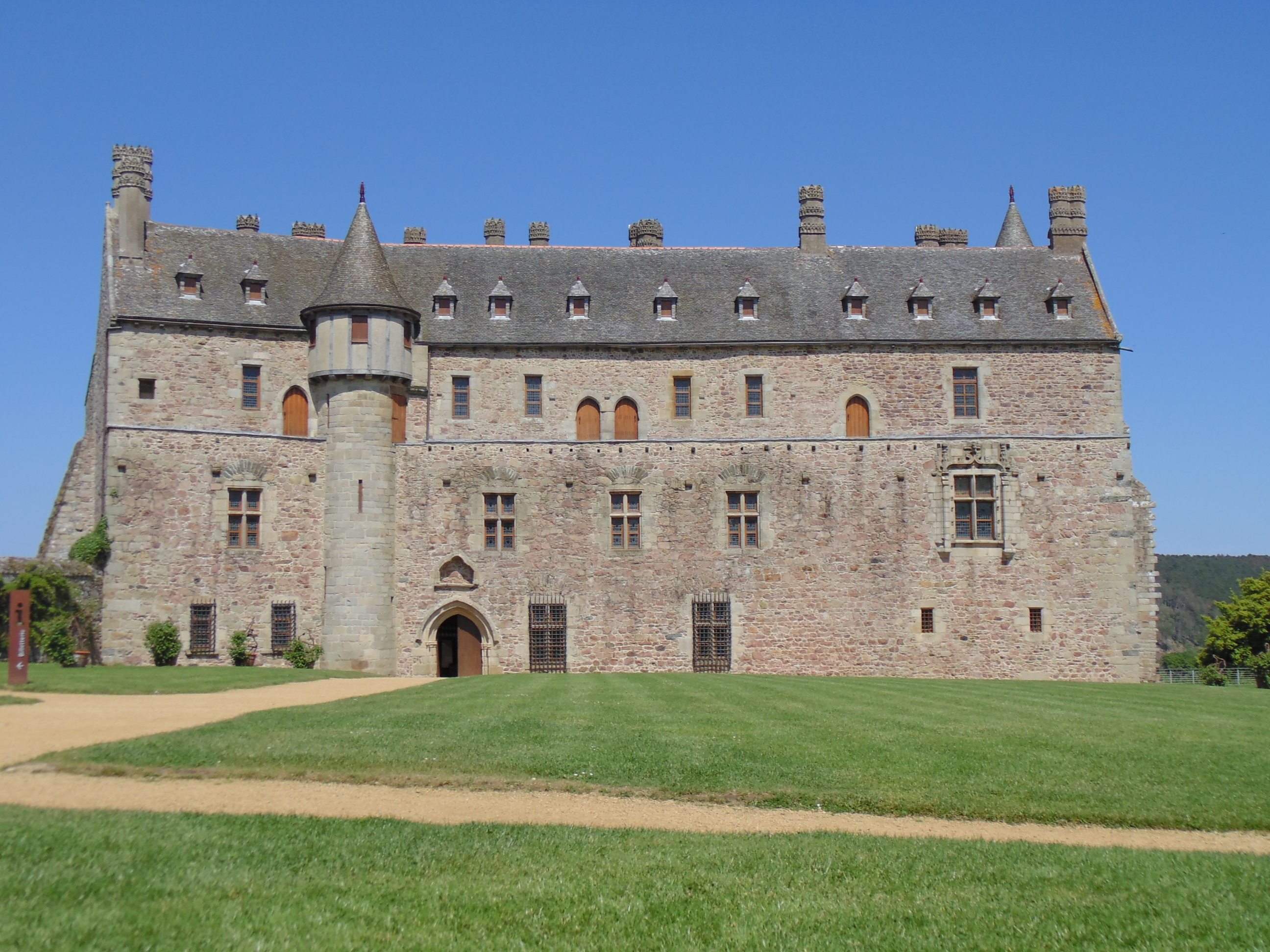 Façade du château de La Roche-Jagu, à Ploezal (Côtes-d'Armor)